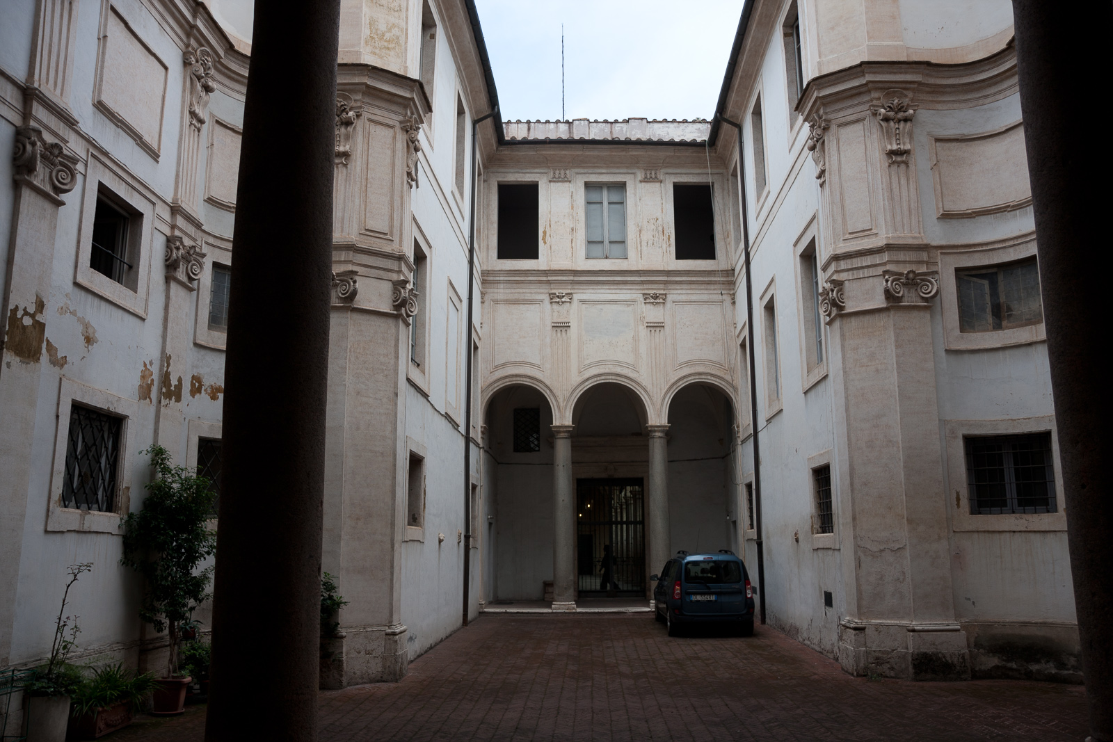 Rione IV Campo Marzio, Roma, Italy